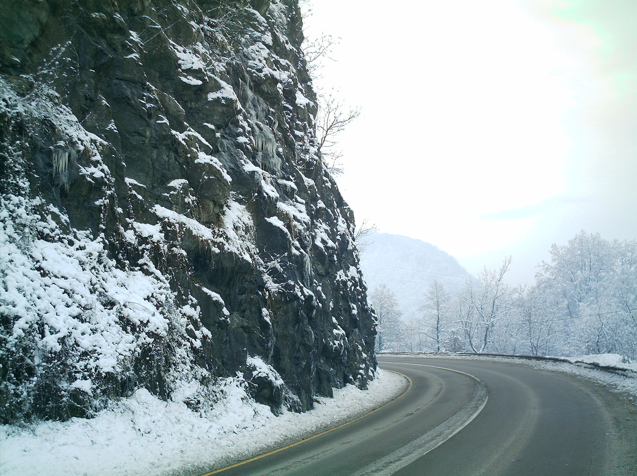 Шкребин Камен